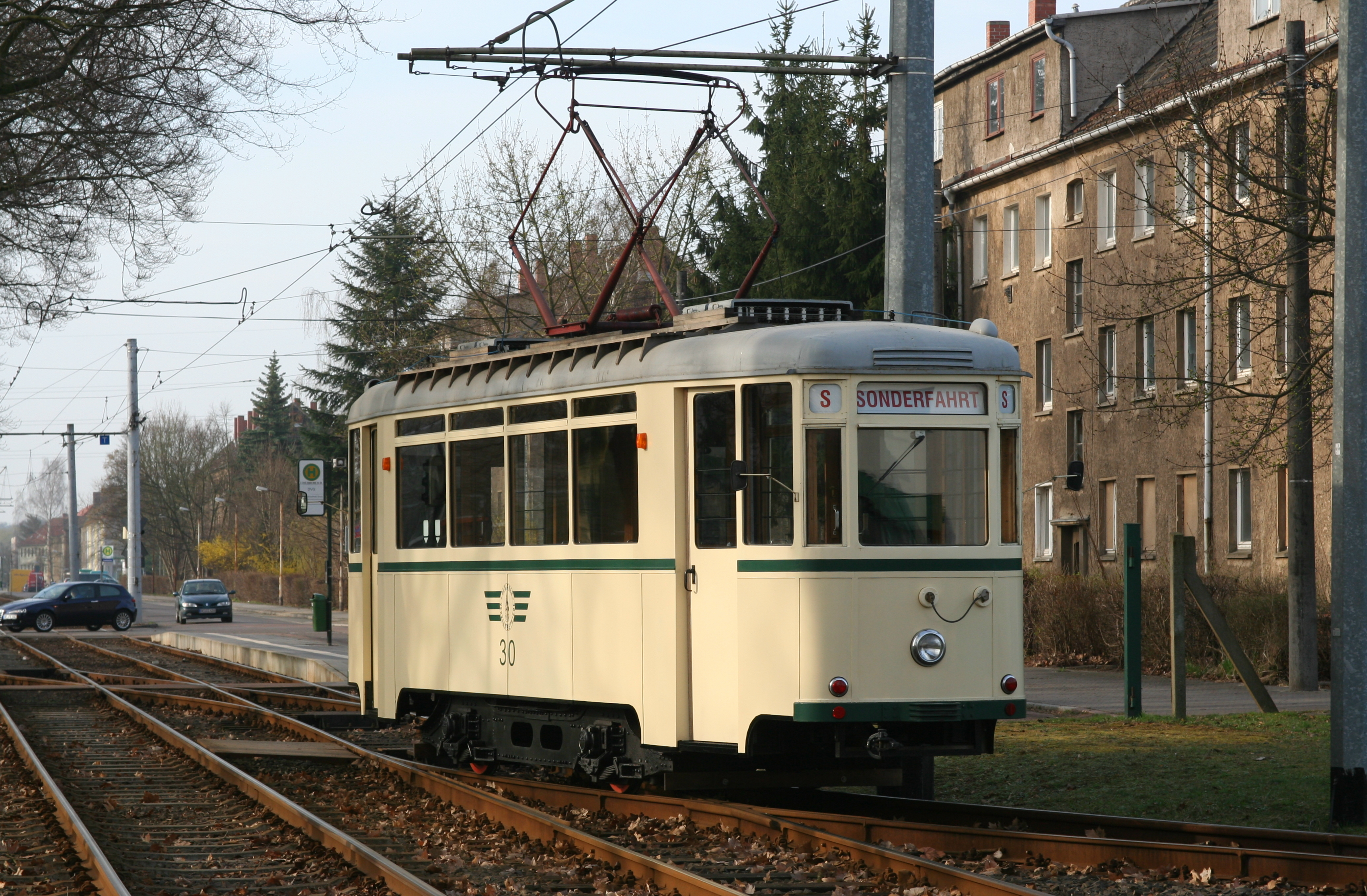 Historischer Triebwagen 30 der DVG am 02.04.2011